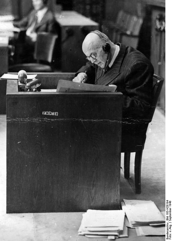 Nürnberger Prozess, Hans Heinrich Lammers 15.9.1948 Nürnberger Wilhelmstrassen Prozess 1948. Den im Nürnberger Wilhelmstrassen-Prozess 1948 angeklagten ehemaligen Reichsminister und Chef der Reichskanzlei, Dr. Hans-Heinrich Lammers, als Zeugen in eigener Sache . Er erklärte, dass Hitler ihn nur geholt habe, weil er sich nicht blamieren und einen Mann haben wollte, der "das Parkett beherrscht". 2133-48 Illus [Nürnberg.- Dr. Hans Heinrich Lammers mit Kopfhörer während der Zeugenanhörung in eigener Sache] Abgebildete Personen: Lammers, Hans-Heinrich Dr.: Reichsminister, Chef der Reichskanzlei, Deutschland